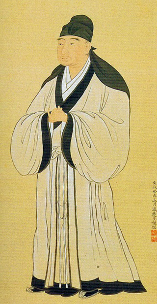 藤原惺窩像 渡辺崋山筆 絹本著色軸装 東京国立博物館蔵